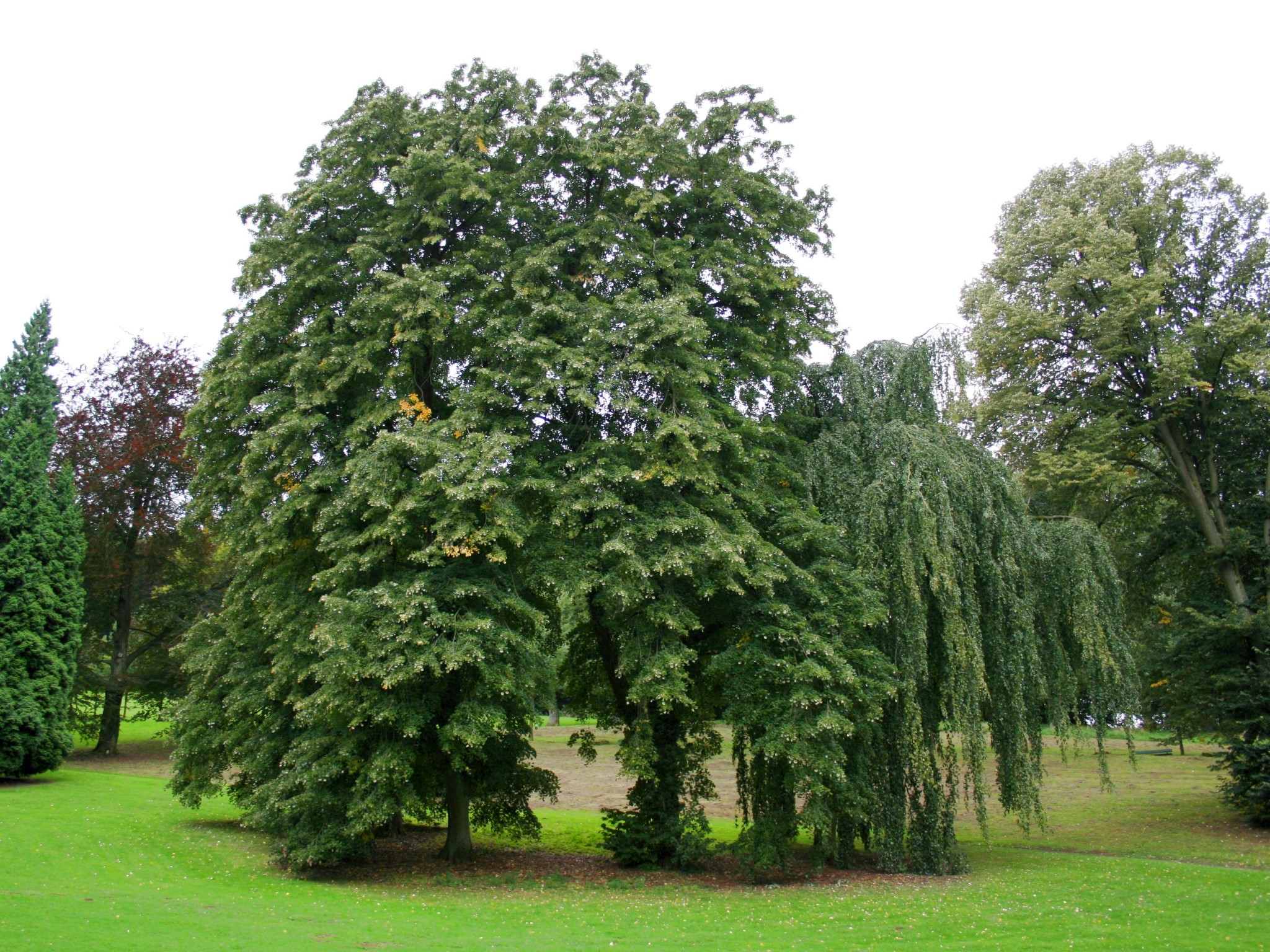 Barmer Anlagen in Wuppertal-Barmen